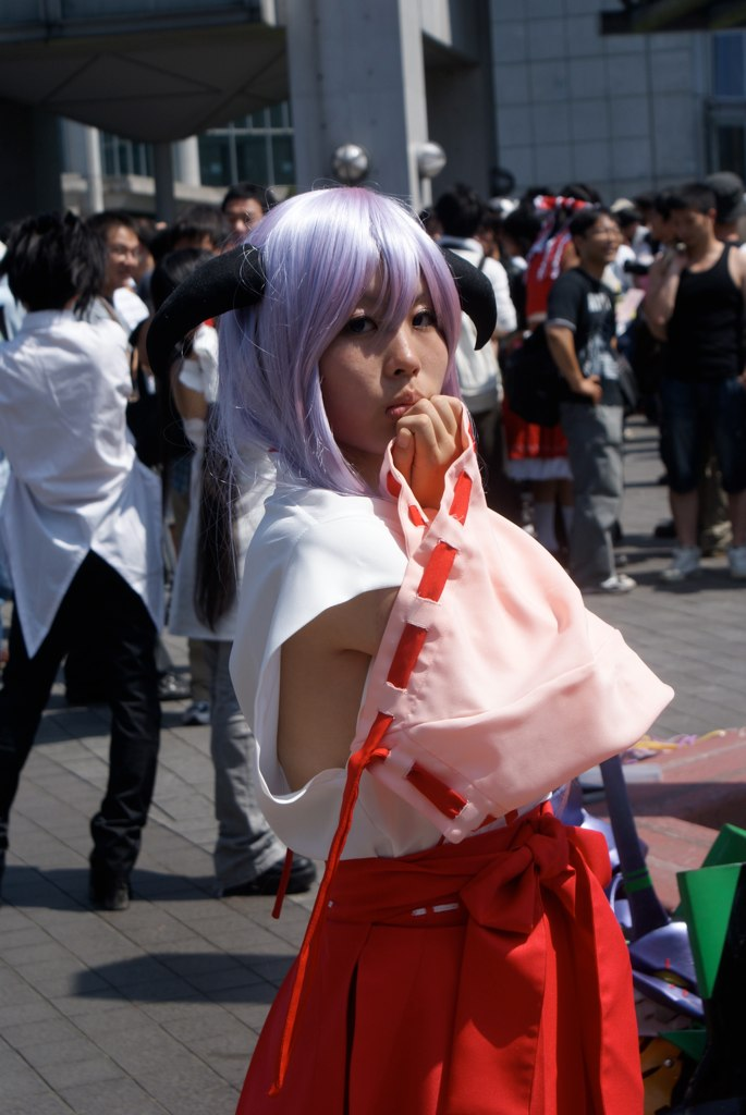 Mujer otaku en 2009